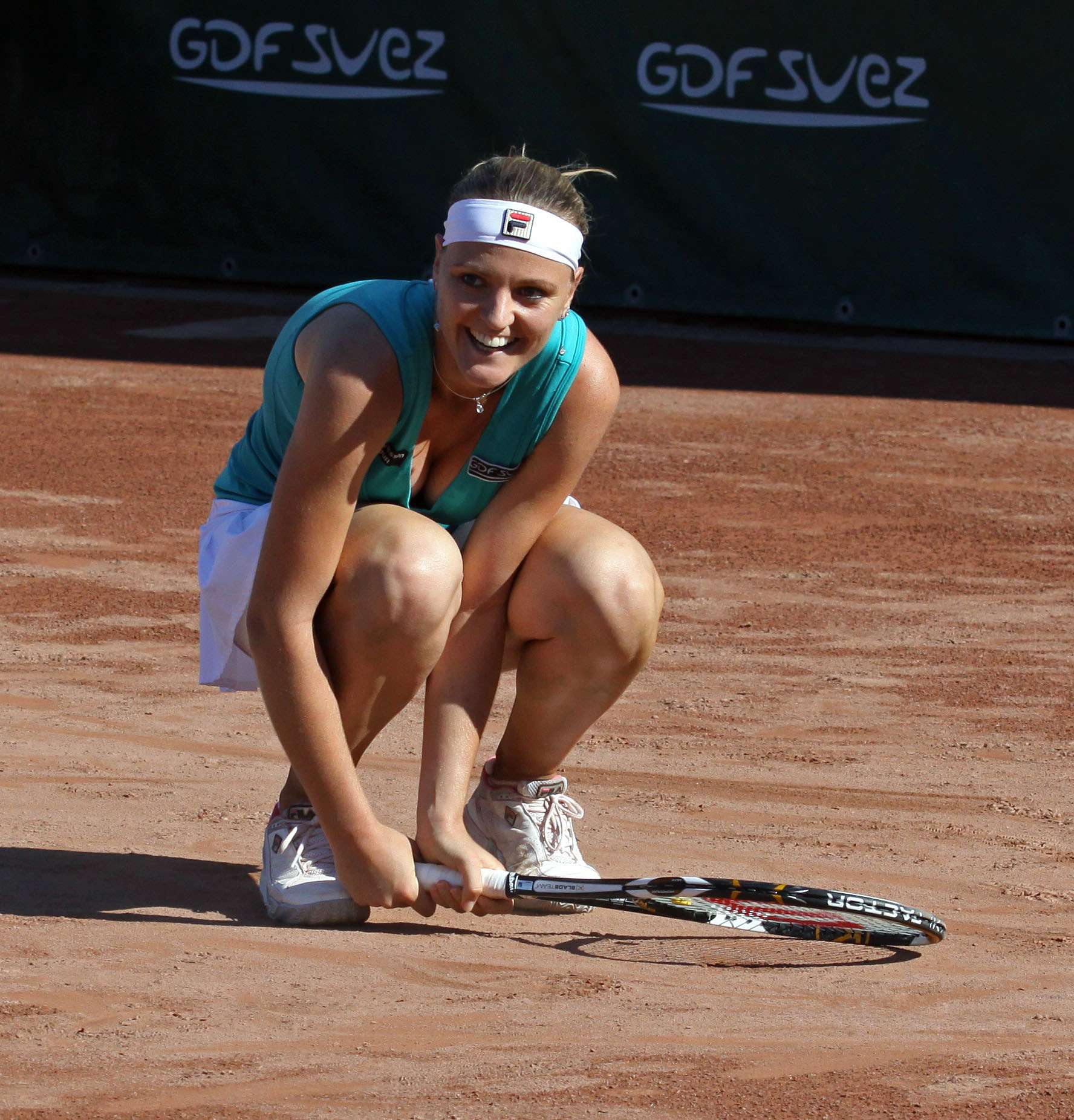 Szávay Ági BP GDF Suez GP. Elődöntő